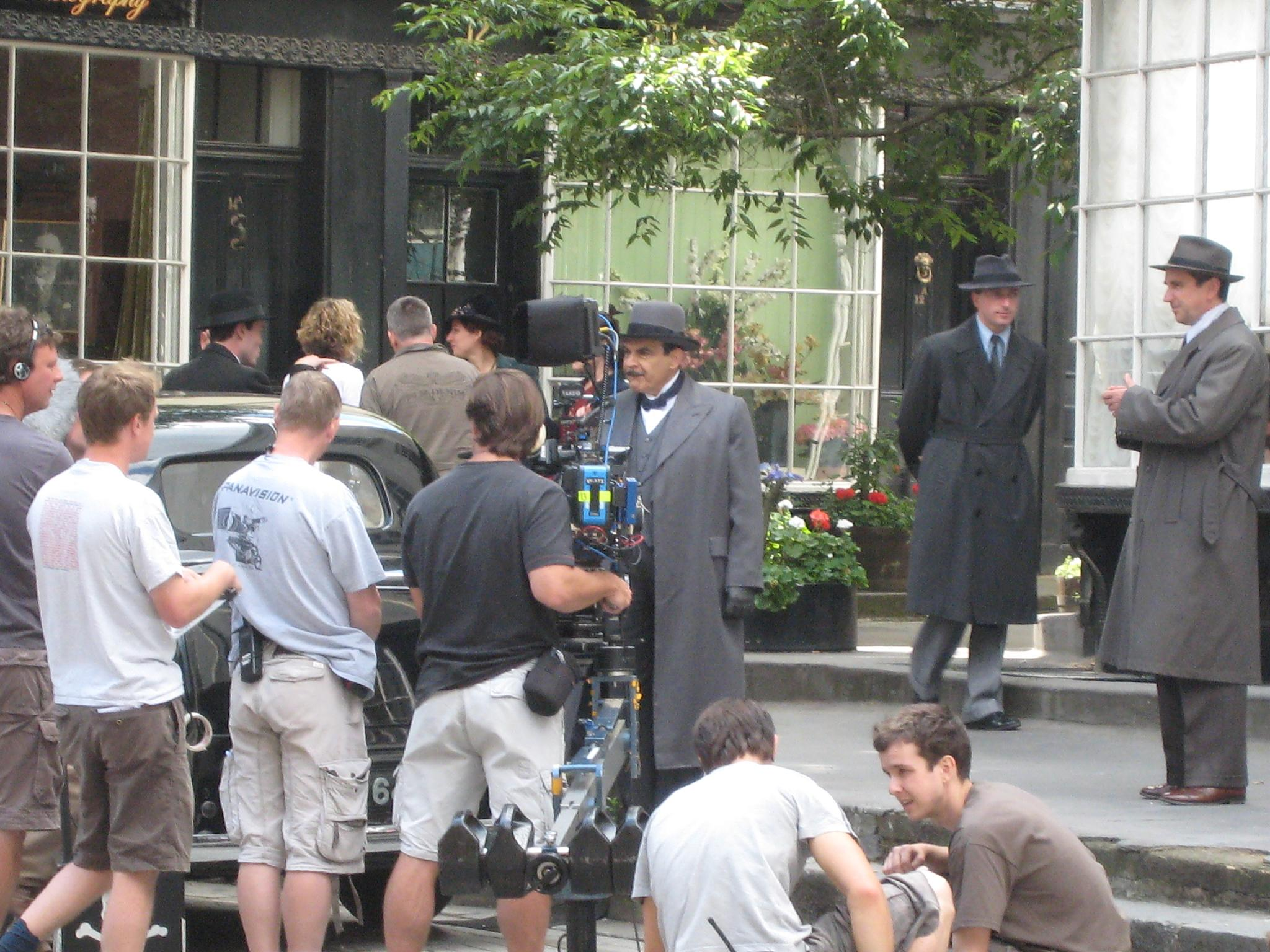 Filming for an episode of Agatha Christie's Poirot in London.